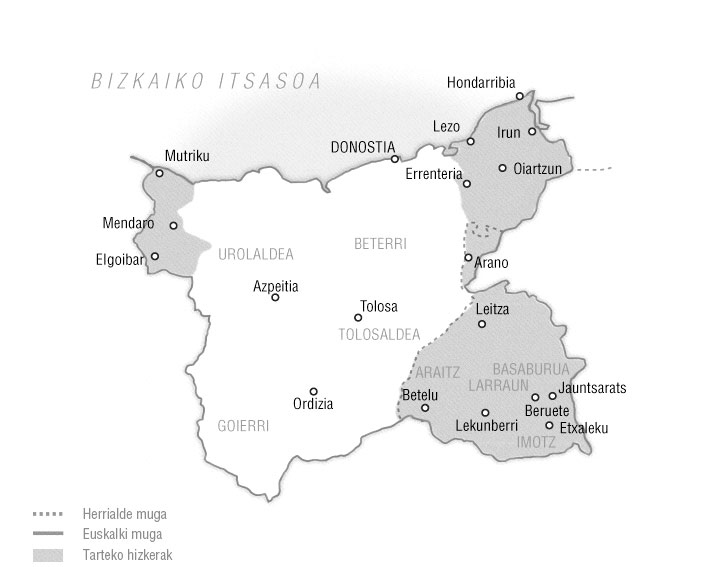 Erdialdeko euskara edo gipuzkerak 2015ean duen hedadura erakusten duen mapa.